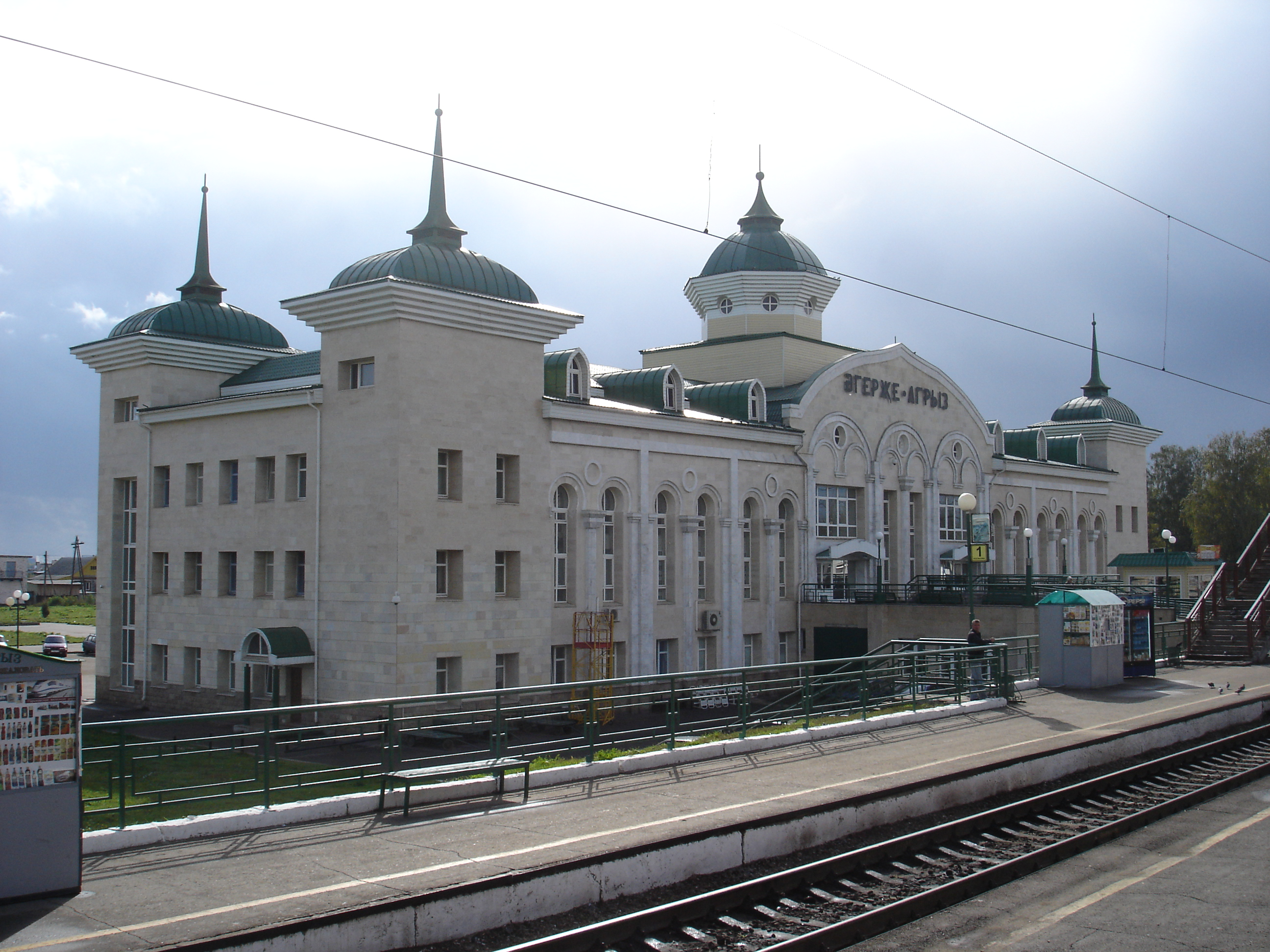 Агрыз - административный центр Агрызского района Татарстана. Железнодорожная станция Агрыз Горьковской ЖД. Здание станции и администрации. Общий вид.